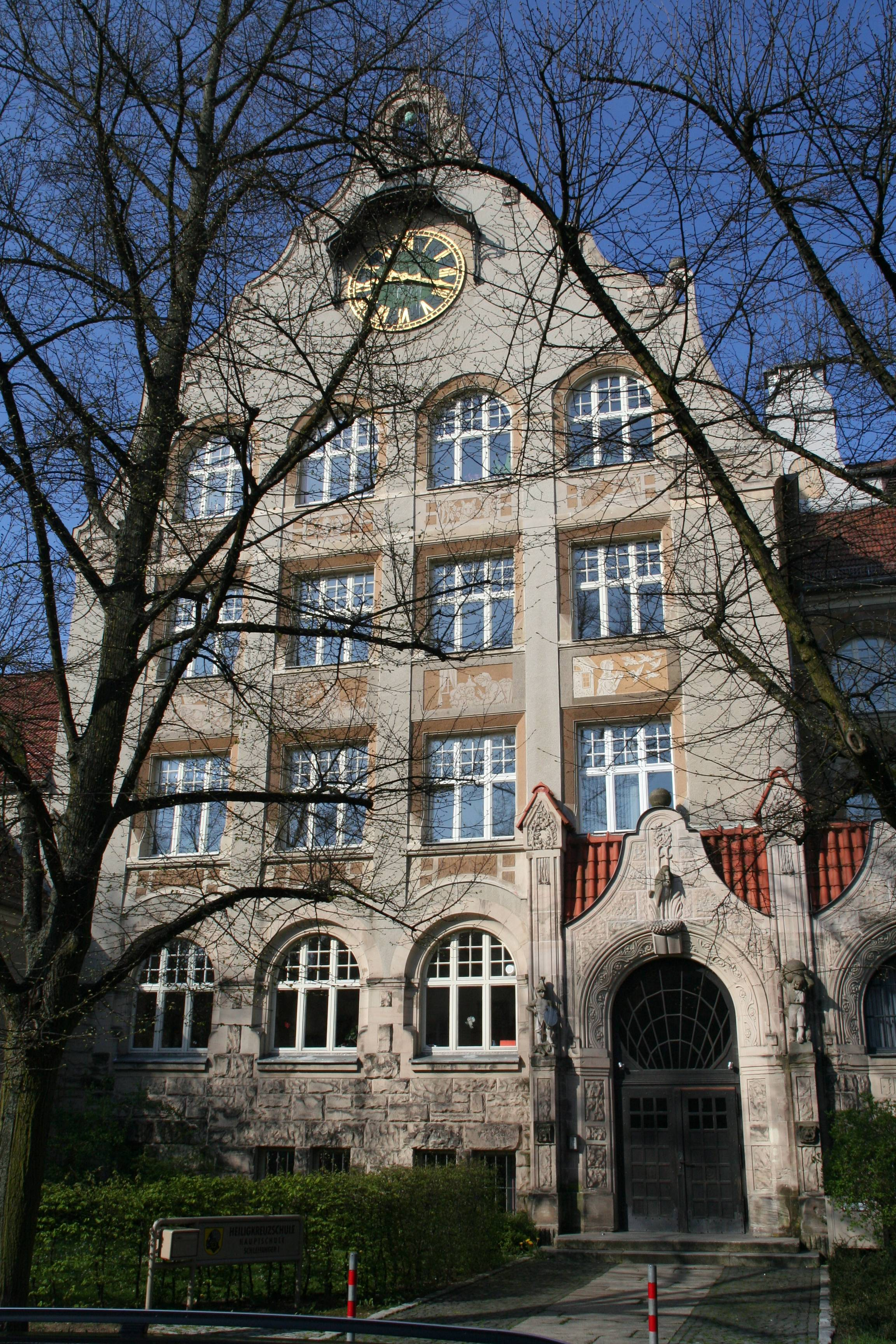 Coburg, Schleifanger 1, Heiligkreuz-Volksschule, Südflügel